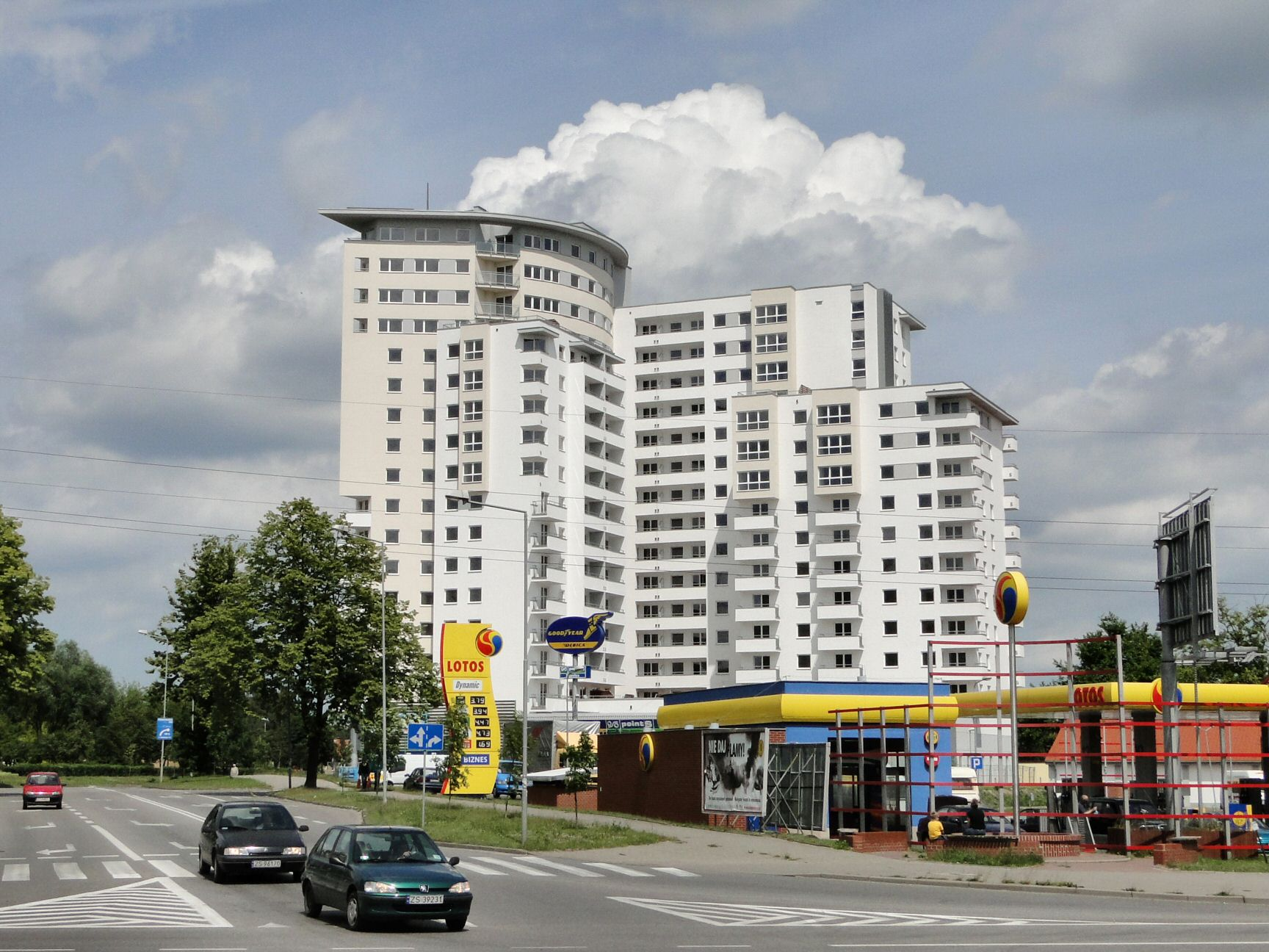 Wieżowiec Widok na Osiedlu Bandurskiego w Szczecinie